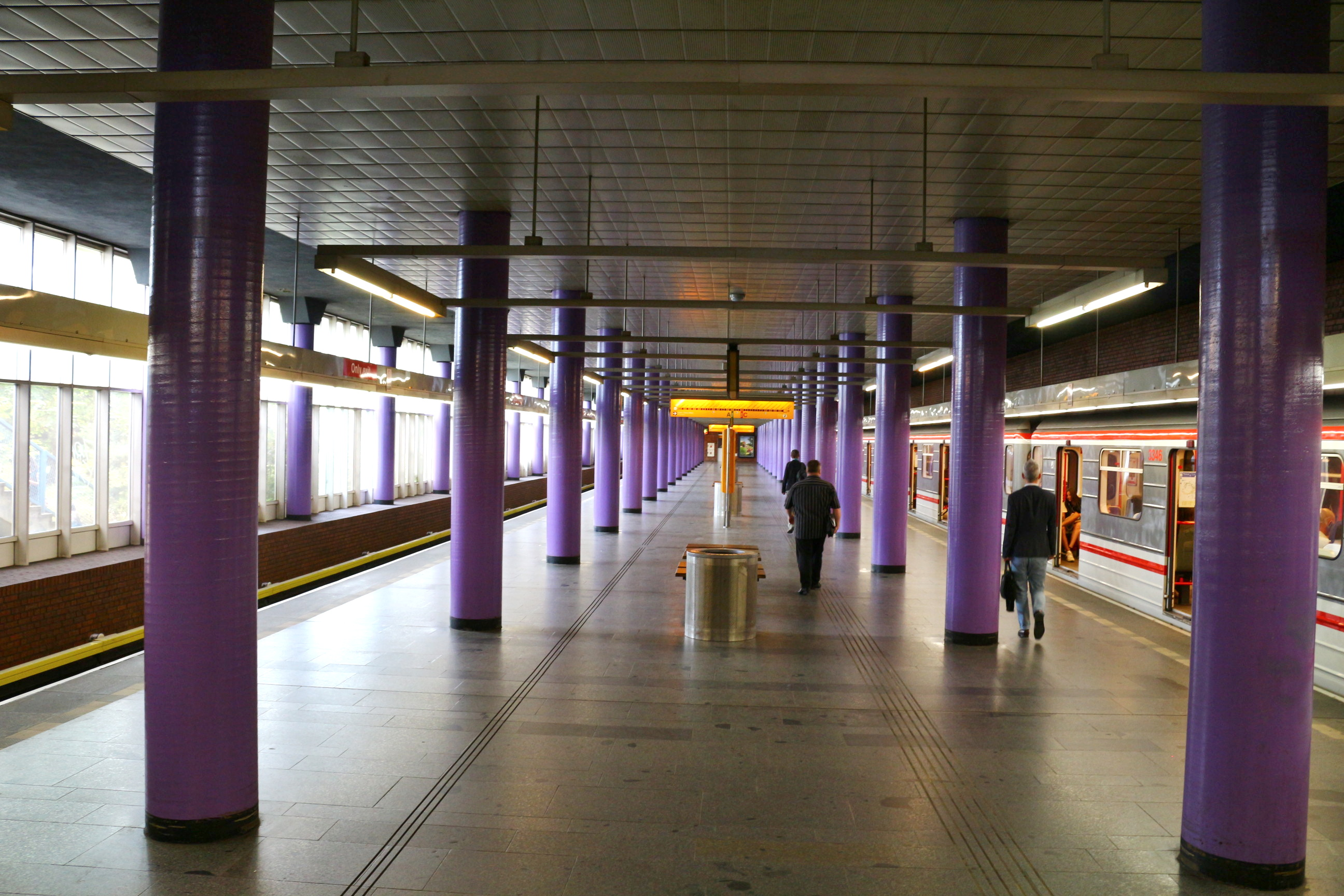 Zličín